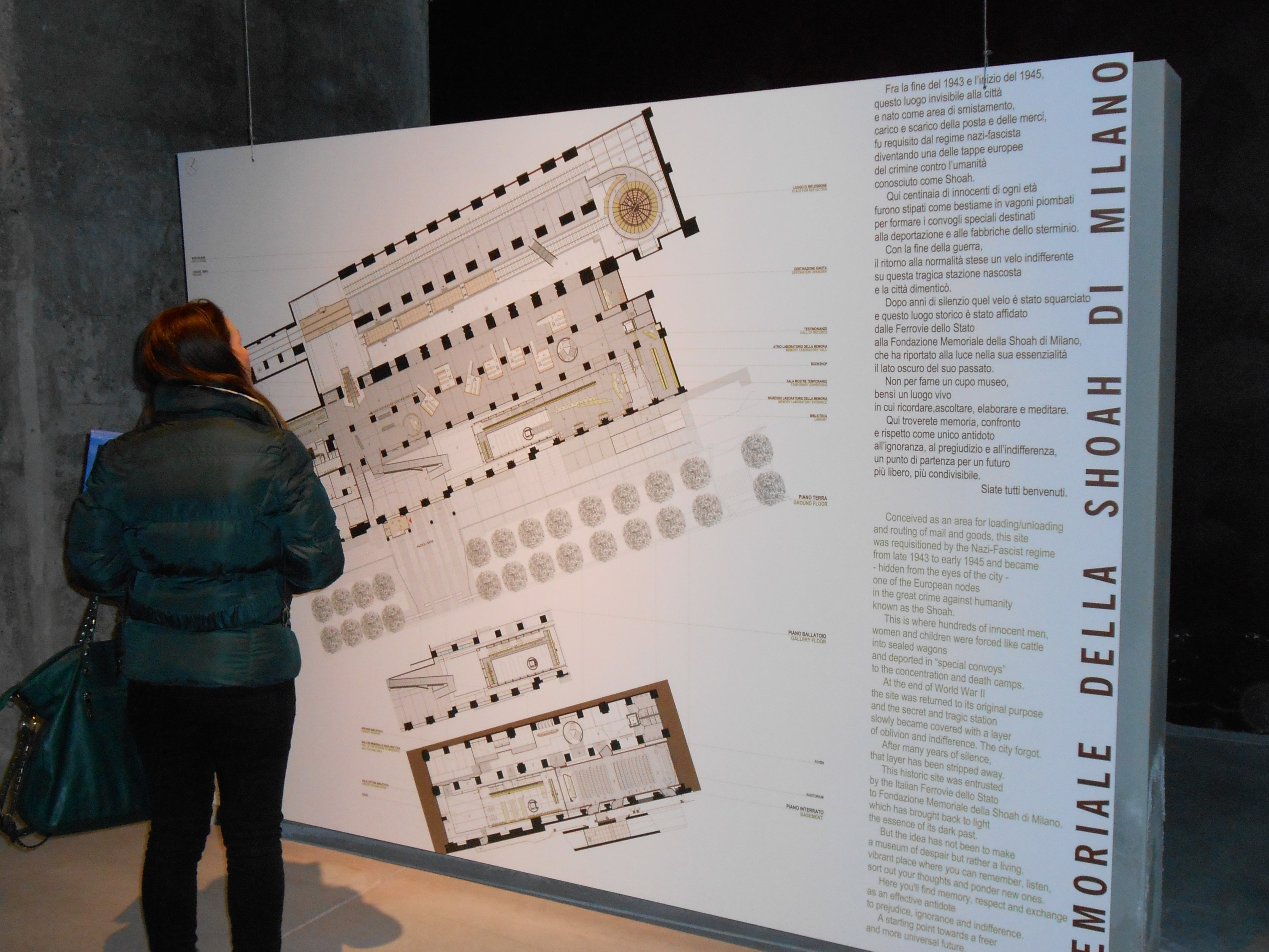 Atrio interno del memoriale della Shoah di Milano - Pianta del Memoriale - Stazione Centrale, piazza Edmond J. Safra, 1